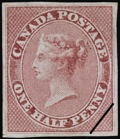 Timbre poste de la province du Canada de ½ pence de 1857